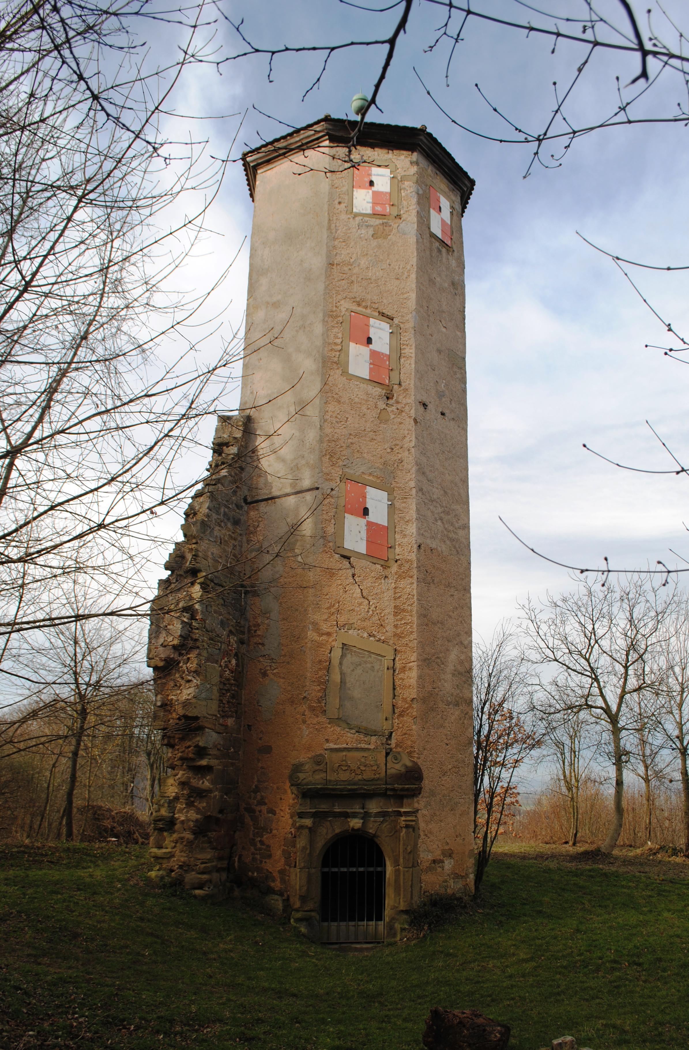 Treppenturm, Burgstall Oberschloss, Castell